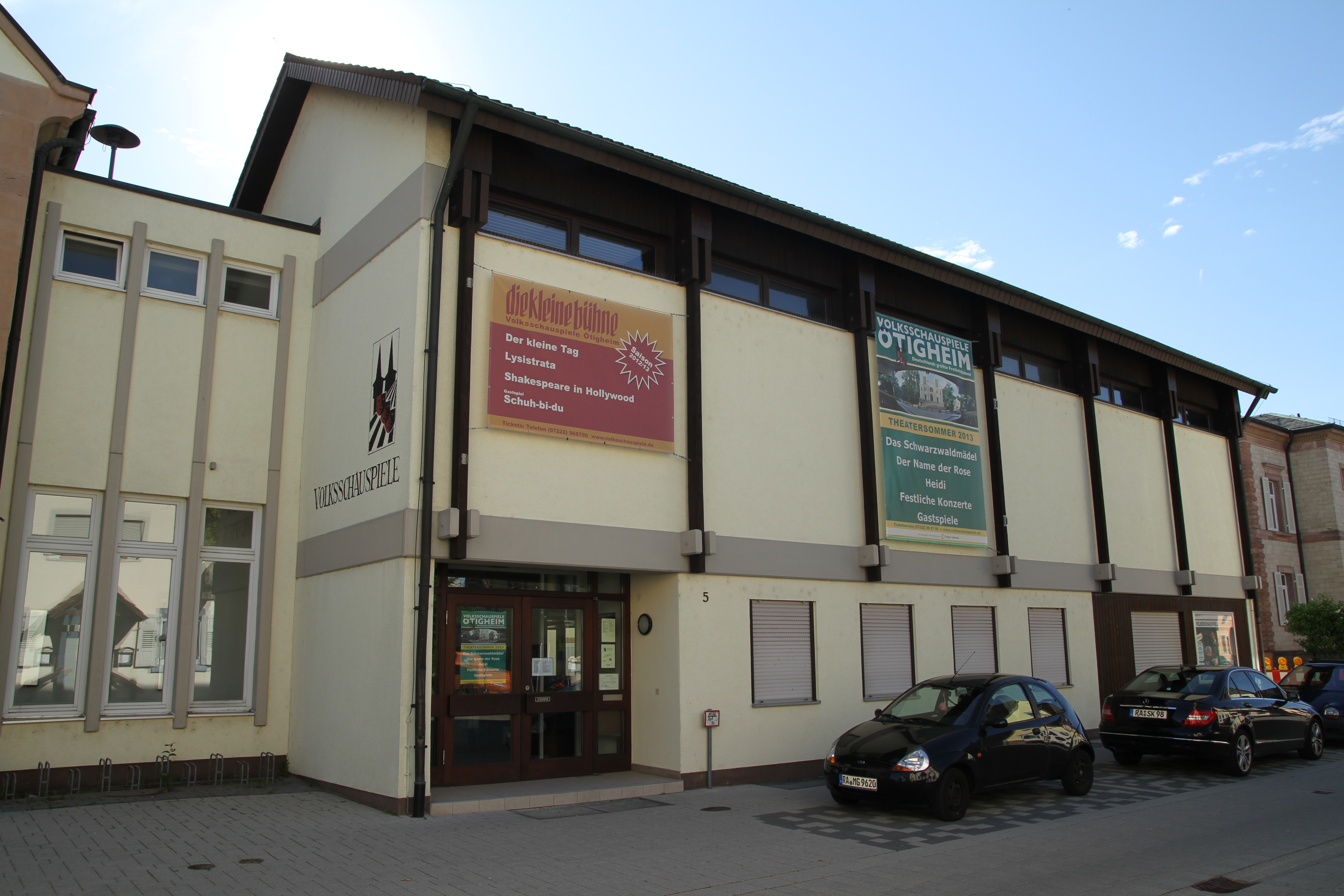 Die Kleine Bühne der Ötigheimer Volksschauspiele, hier finden vor allem im Winter die Auftritte statt.